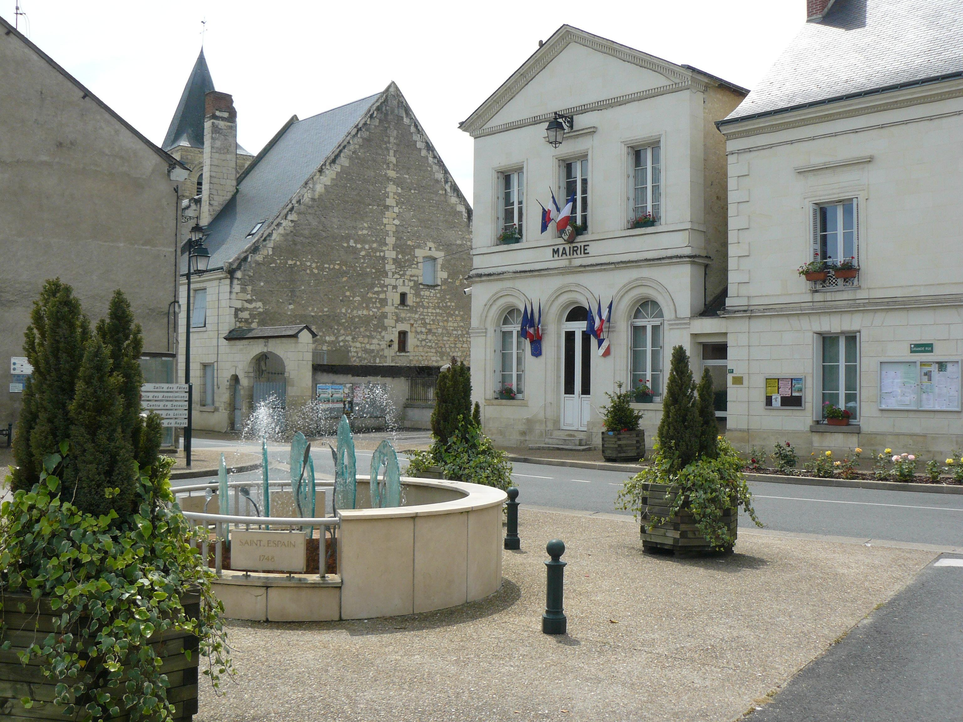 Place de la mairie de Saint-Epain